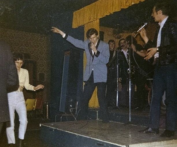 Sunsets in Walsall 1974